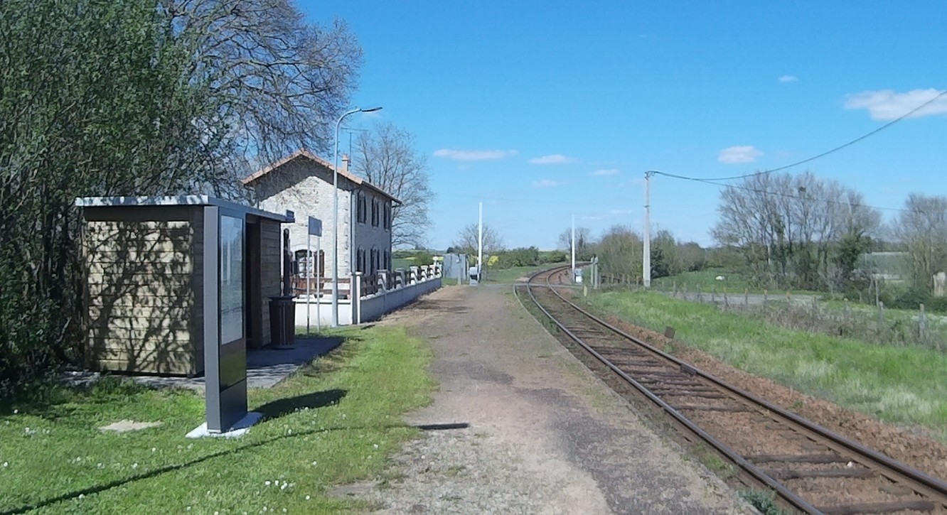 Photo de la petite gare de Prissé-la-Charrière